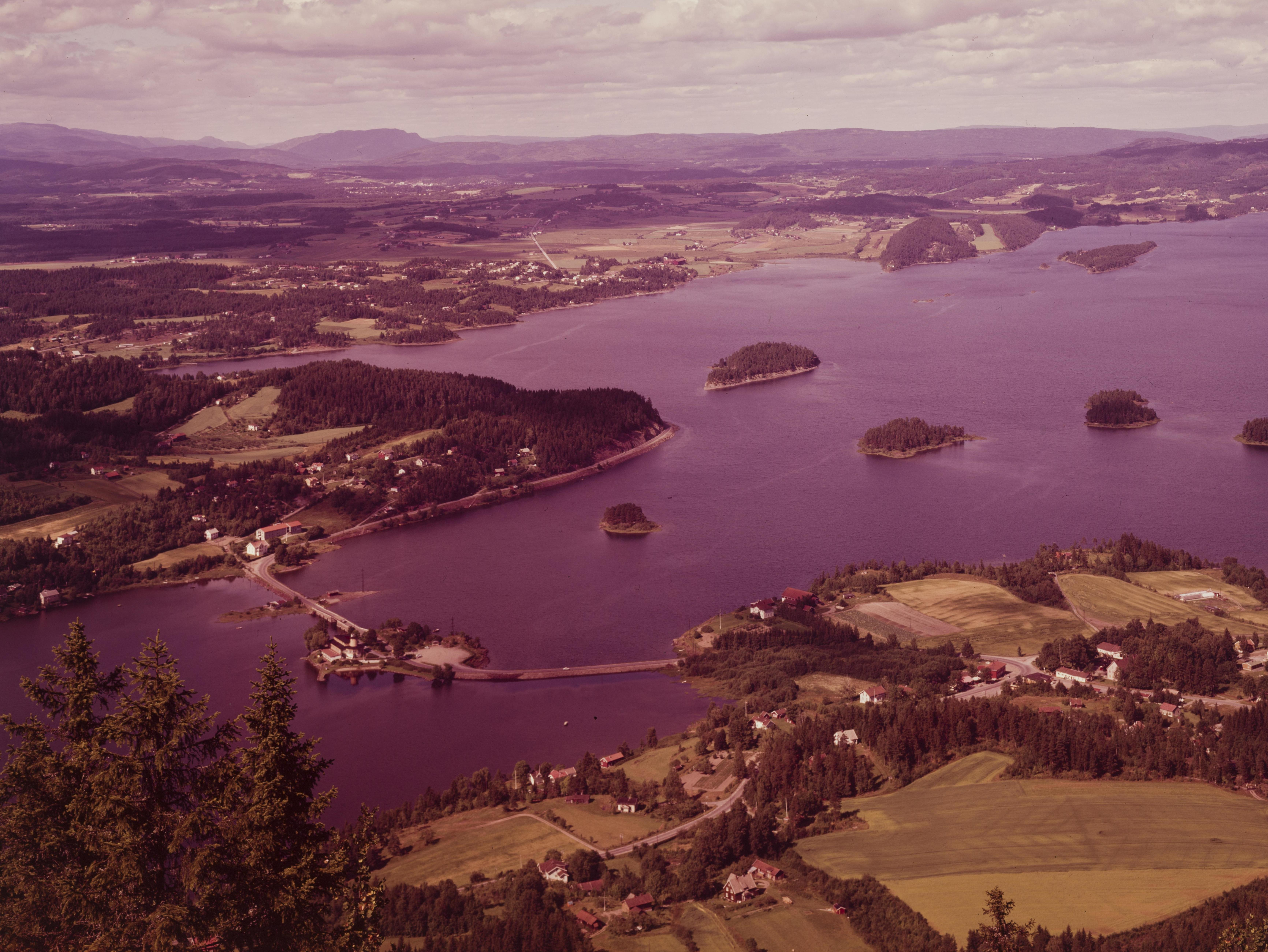 Bildet er hentet fra Nasjonalbibliotekets bildesamling. Anmerkninger til bildet var: Tittel er hentet fra emballasje. Steinsfjorden,Tyrifjorden, Hole, Buskerud